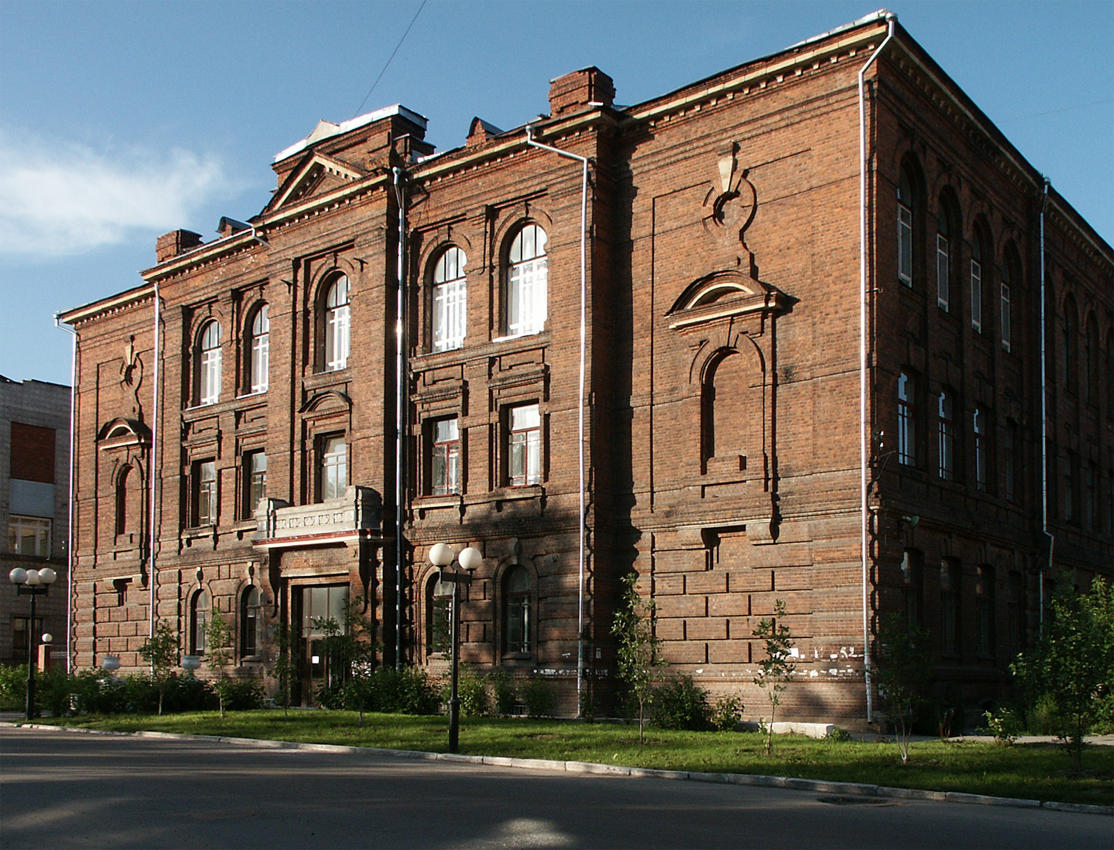 Главный корпус ТГАСУ в пер.Макушина